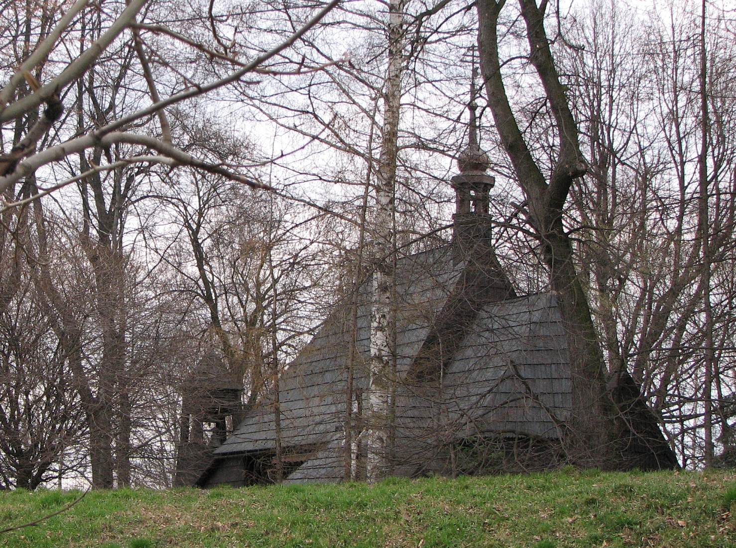 Pietrowice Wielkie - kościół odpustowy p.w. Świętego Krzyża, drewniany